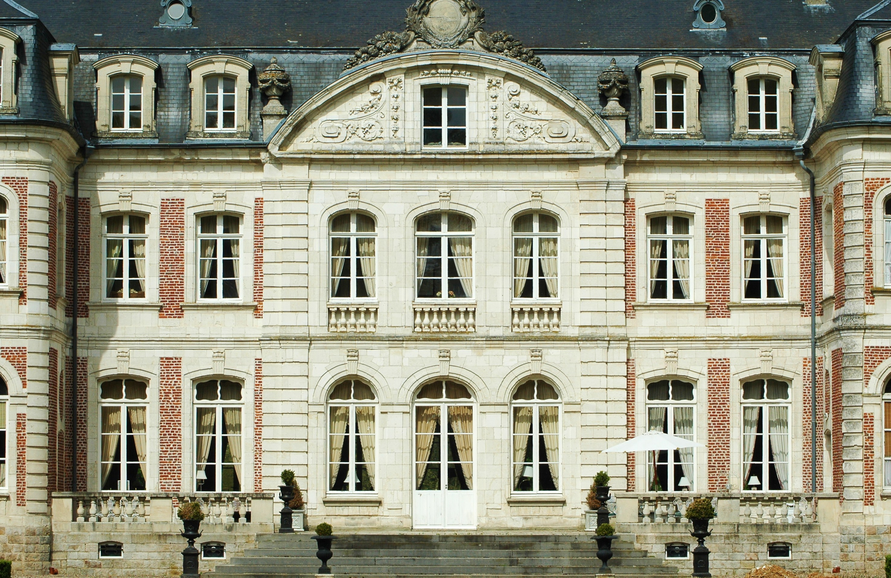 Façade du château de Remaisnil, Somme, France